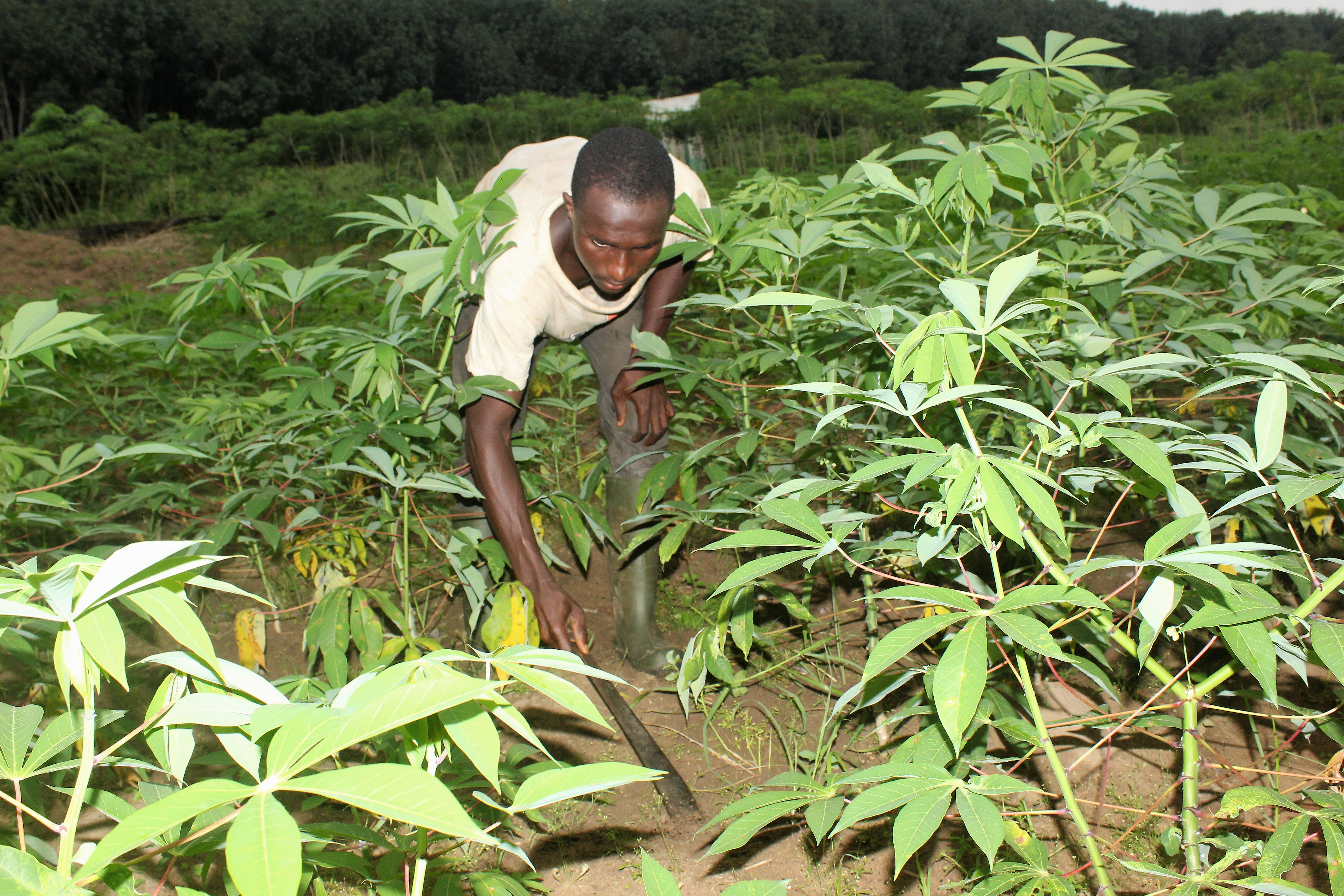 un cultivateur de manioc entrain de nettoyer son champ à Toupah - Côte d'Ivoire. This is an image of "African people at work" from Ivory Coast